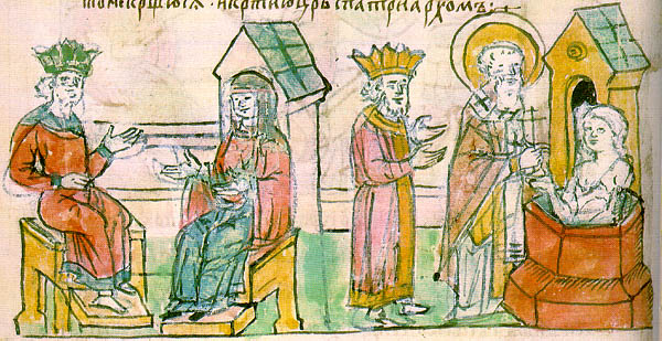 Radzivill chronicle. Olga of Kiev visits Konstantinopol in 955. Крещение княгини Ольги в Царьграде : «Иде Олга во Грекы, и прииде ко Царюгороду». Стр. 31 обр.